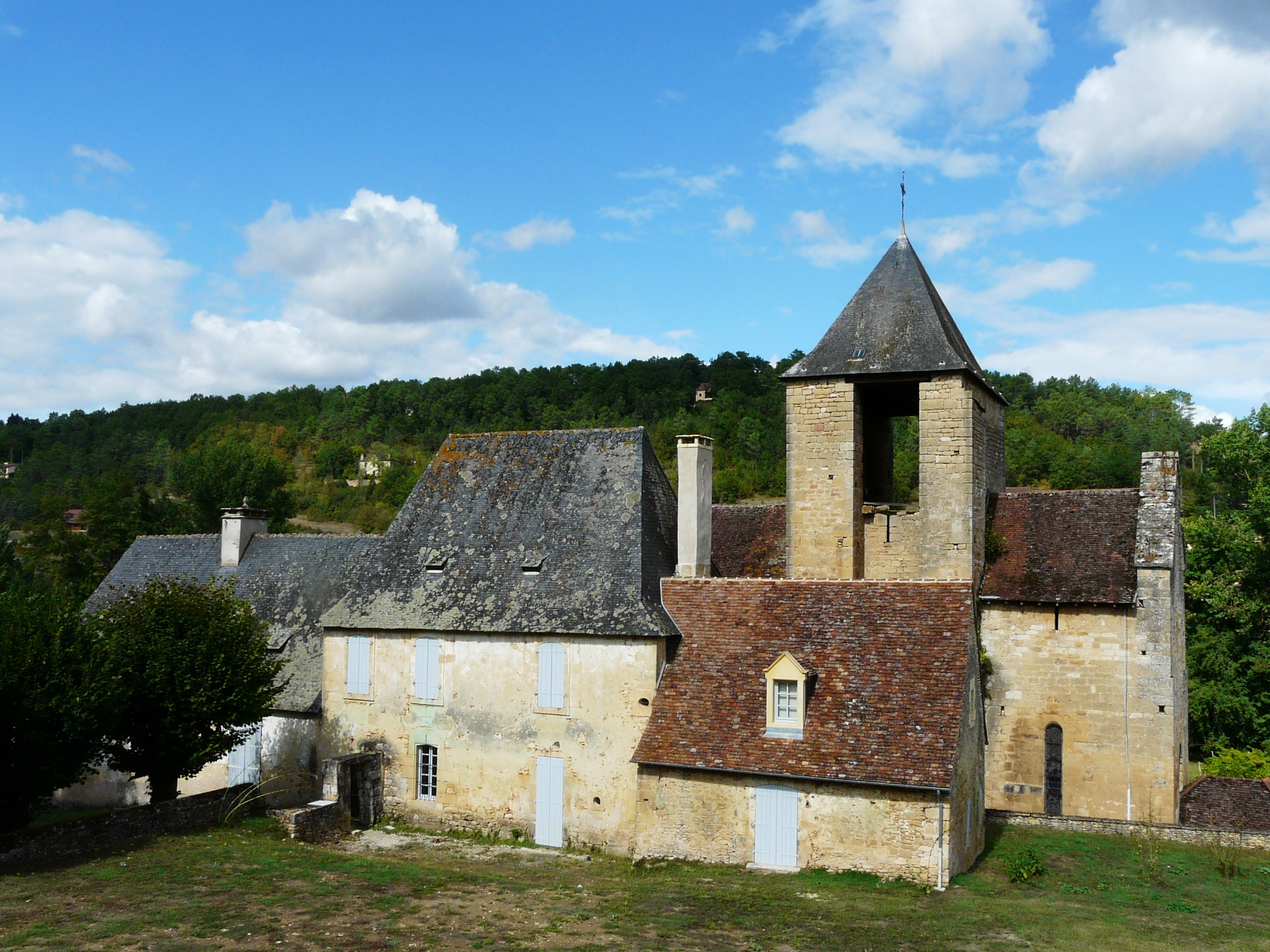 Le presbytère (au premier plan) et l'église d'Auriac-du-Périgord, Dordogne, France.